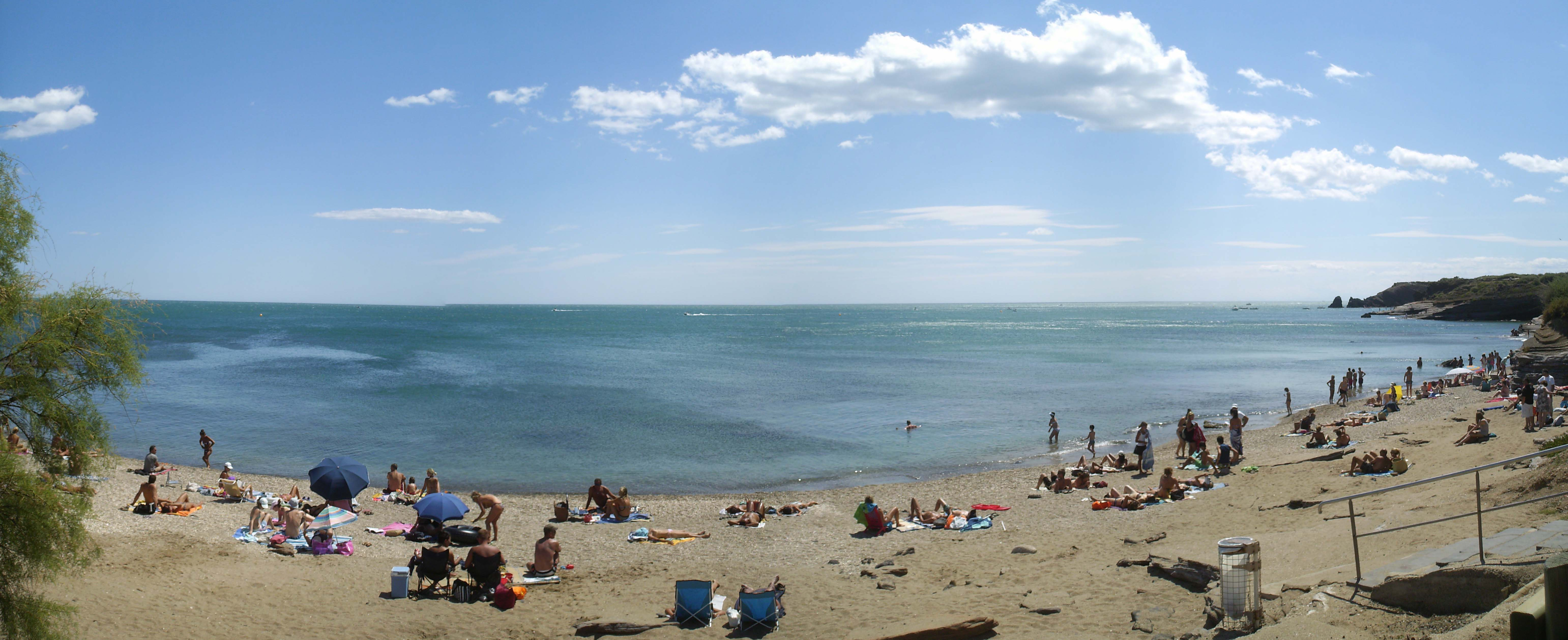 Plage de la Grande Conque au Cap-d'Agde (Agde, Hérault, France).